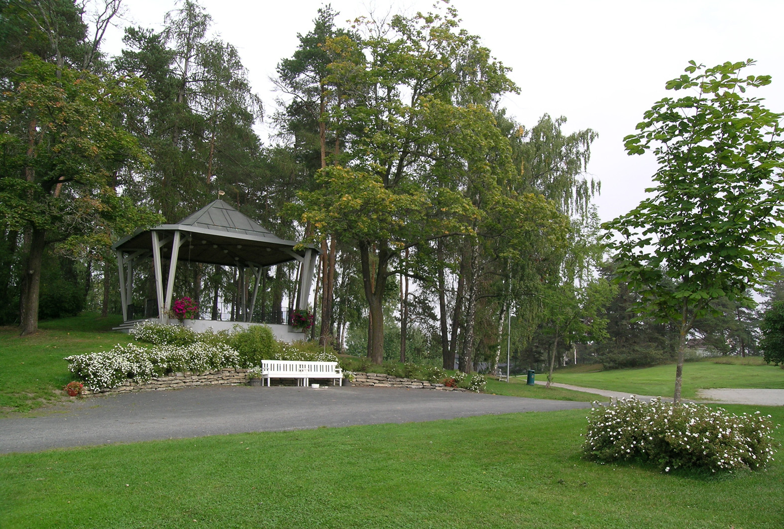 Hamar park, Hamar, Norway.